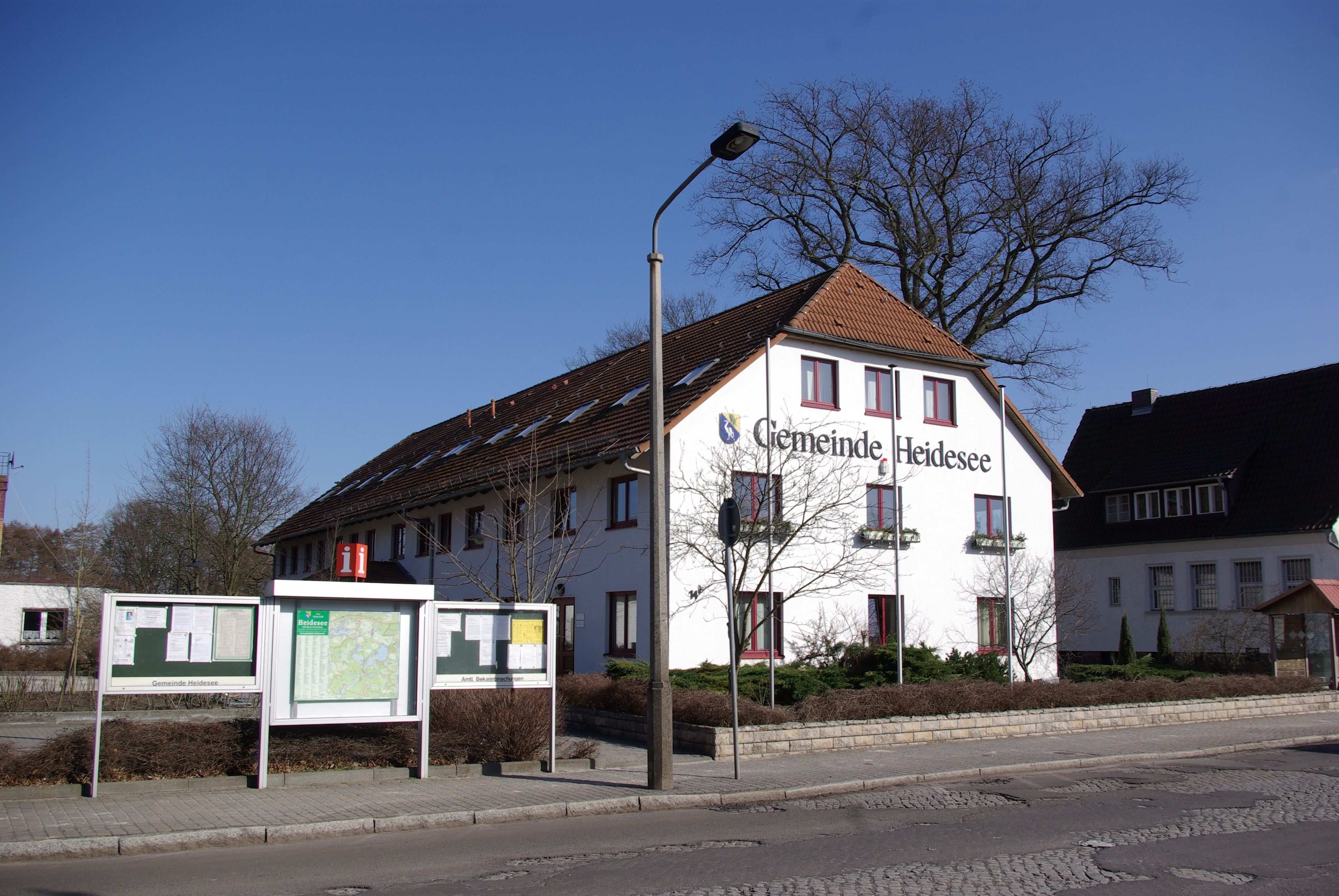 Friedersdorf in der Gemeinde Heidesee in Brandenburg. Das Rathaus im Ortsteil Friedersdorf. Das Rathaus liegt schräg gegenüber der Kirche.